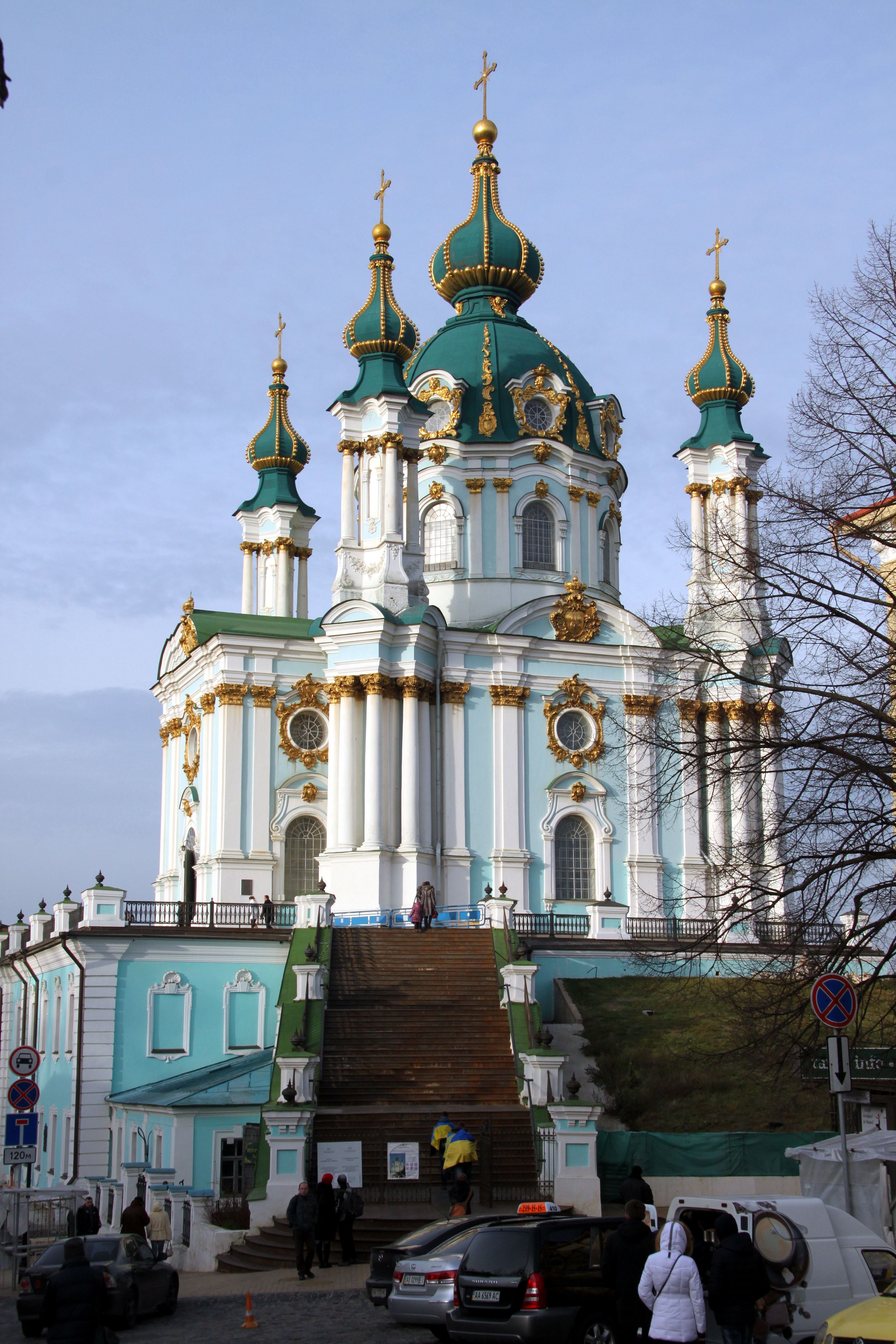 Церква Андріївська, Андріївський узвіз, 23, Київ